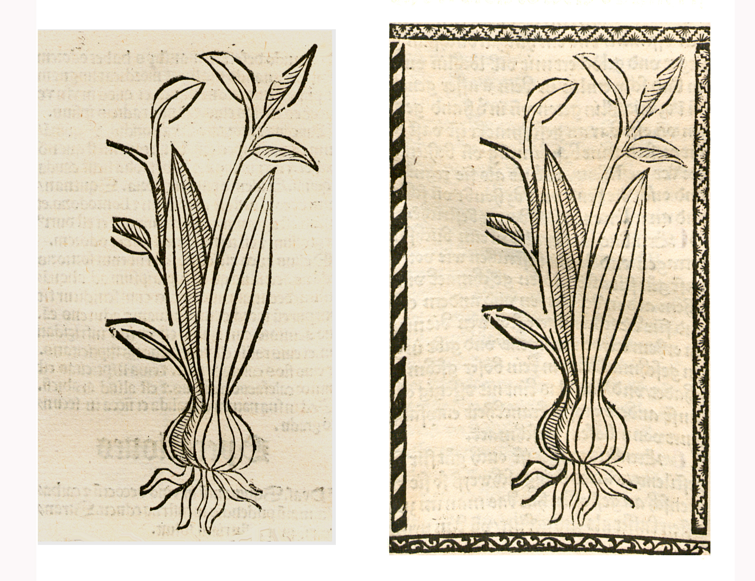 Abbildung von: Eschlauch